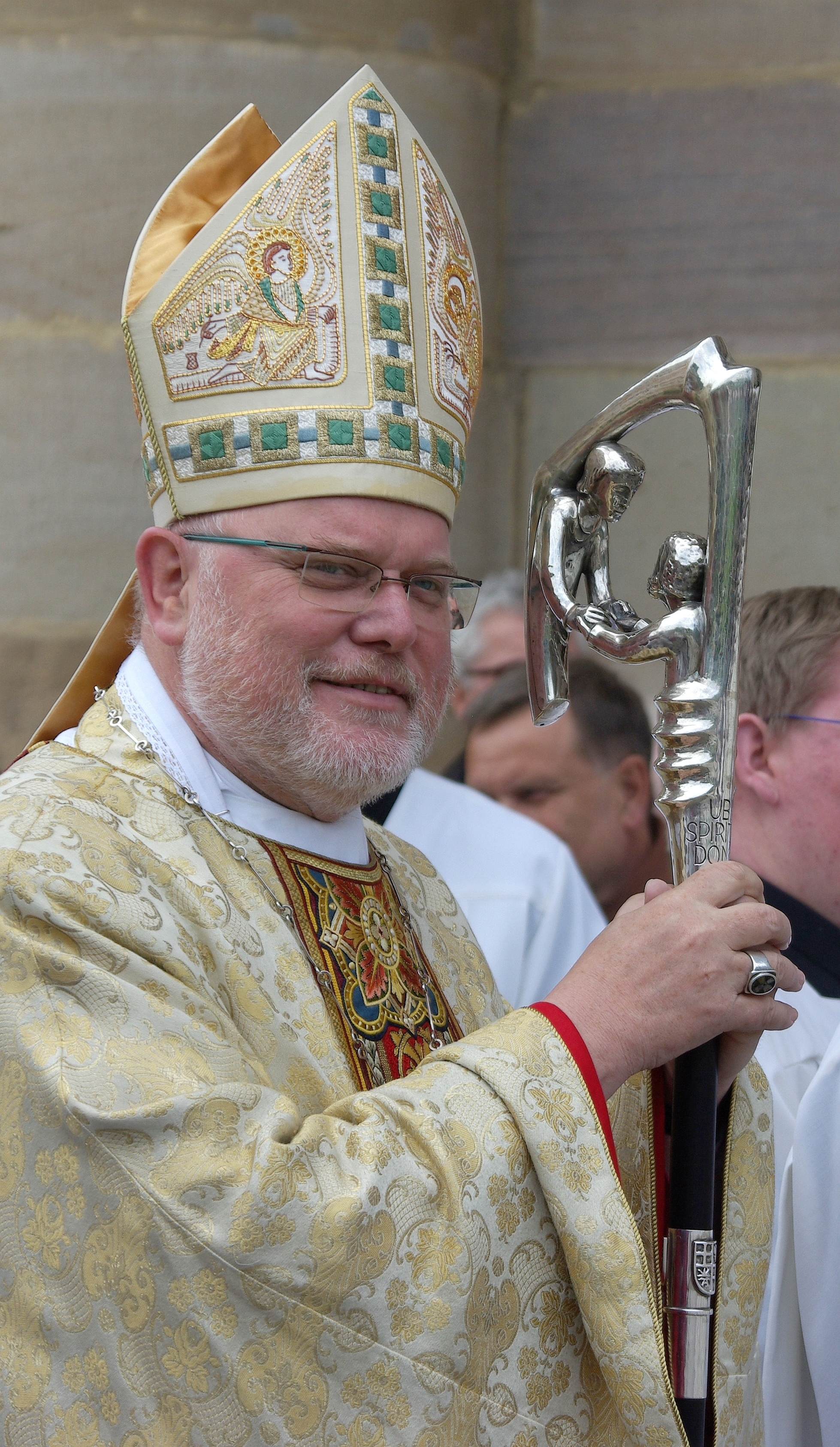 Reinhard Marx als Prior des deutschen Ordens beim Einzug zur Investitur der Deutschen Statthalterei des Ritterorden vom Heiligen Grab zu Jerusalem am 16.5.2009 in den Hohen Dom zu Fulda (Germany)